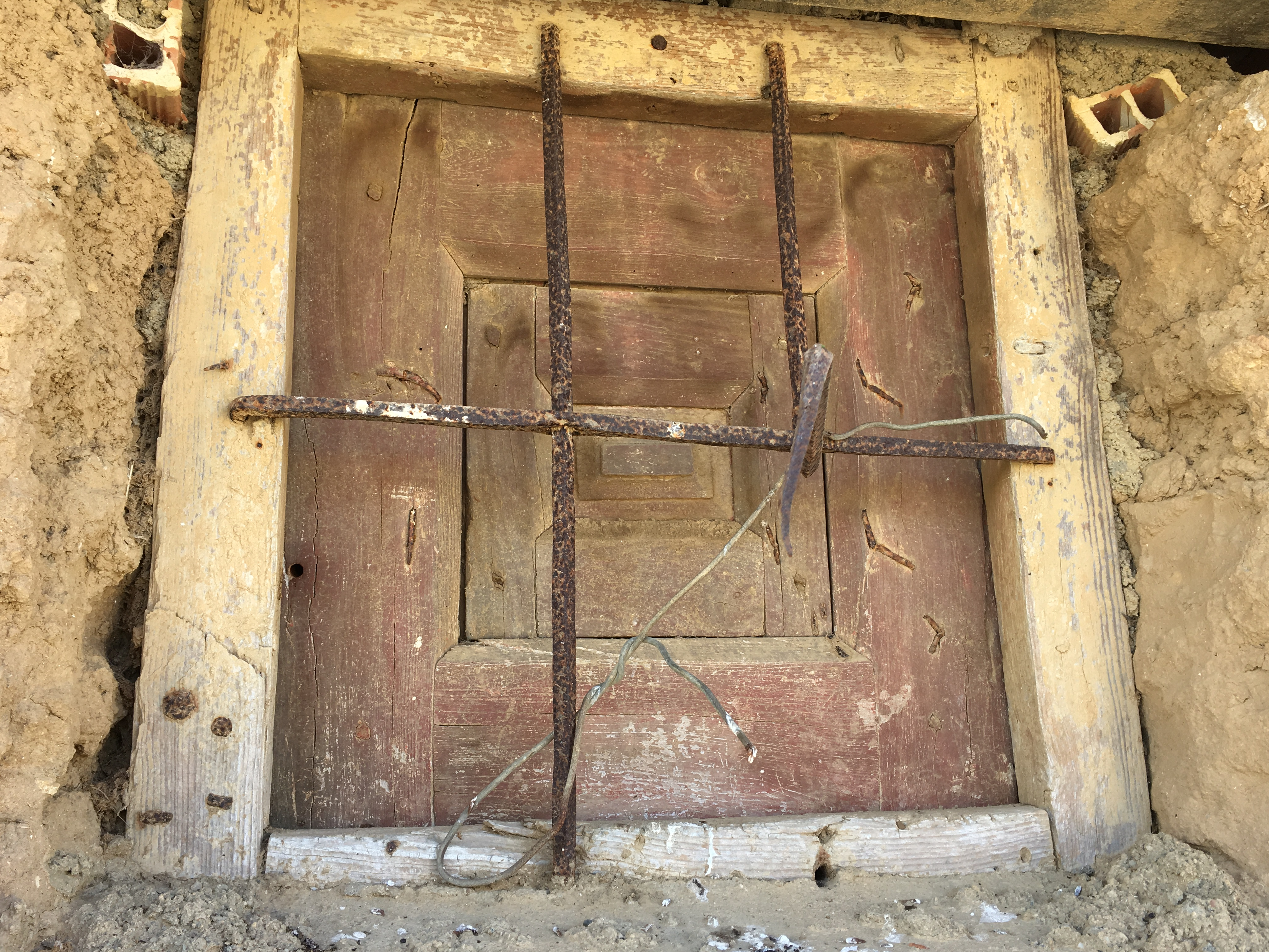 Villaesper Milenario